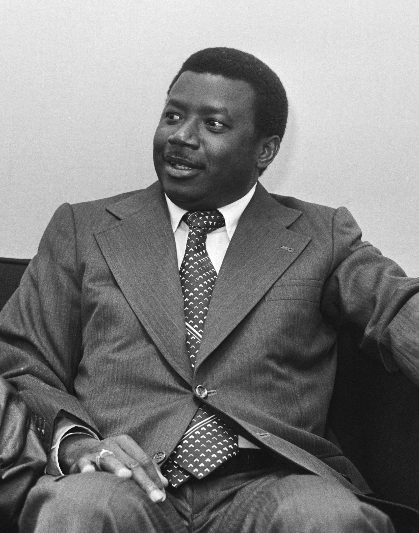 Guinee Bissau , Minister van Buitenlandse Zaken Victor Saude Maria